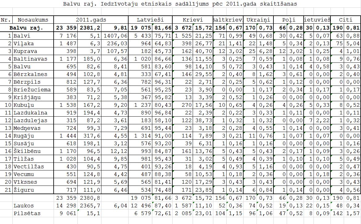 Рузультаты переписи населения Латвии 2011 года